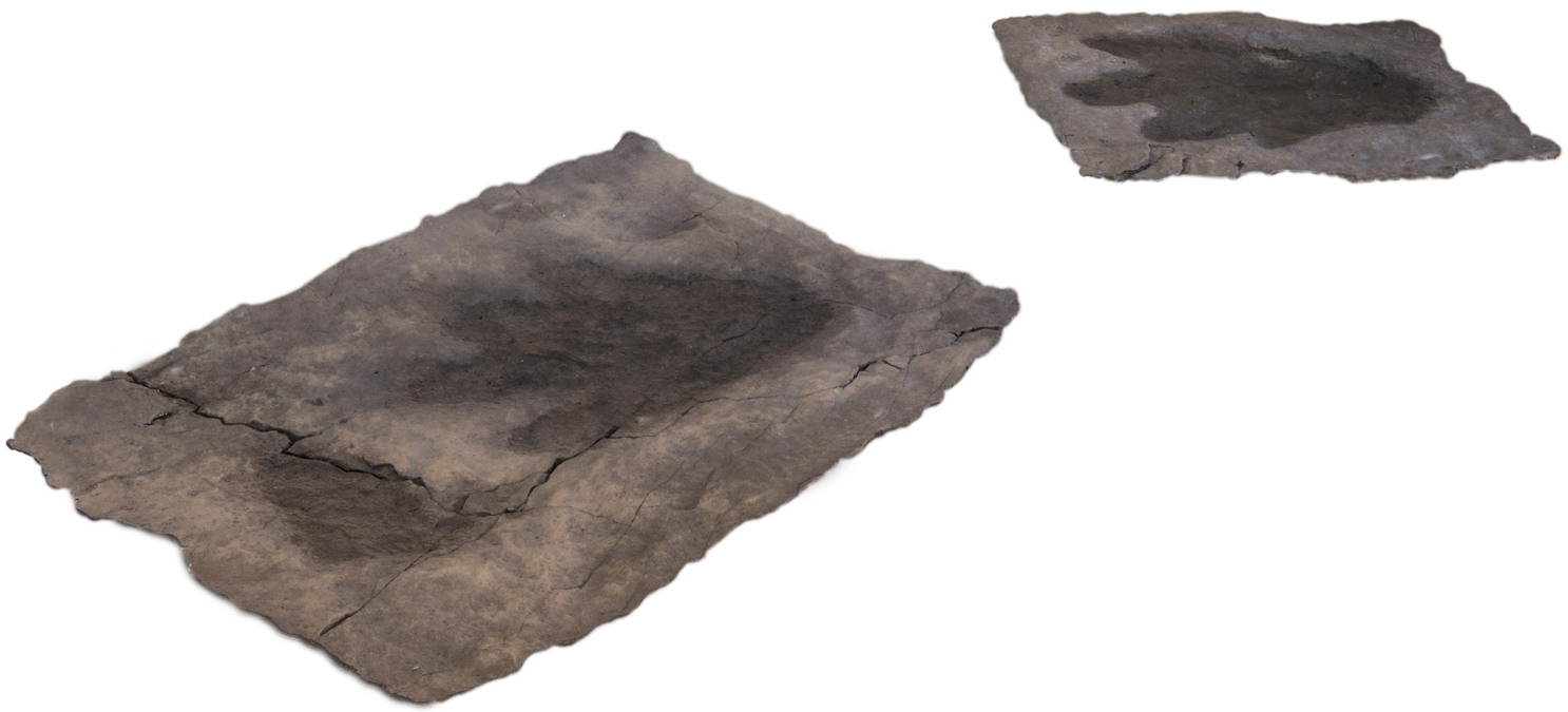 Orma di dinosauro prosauropode. Replica